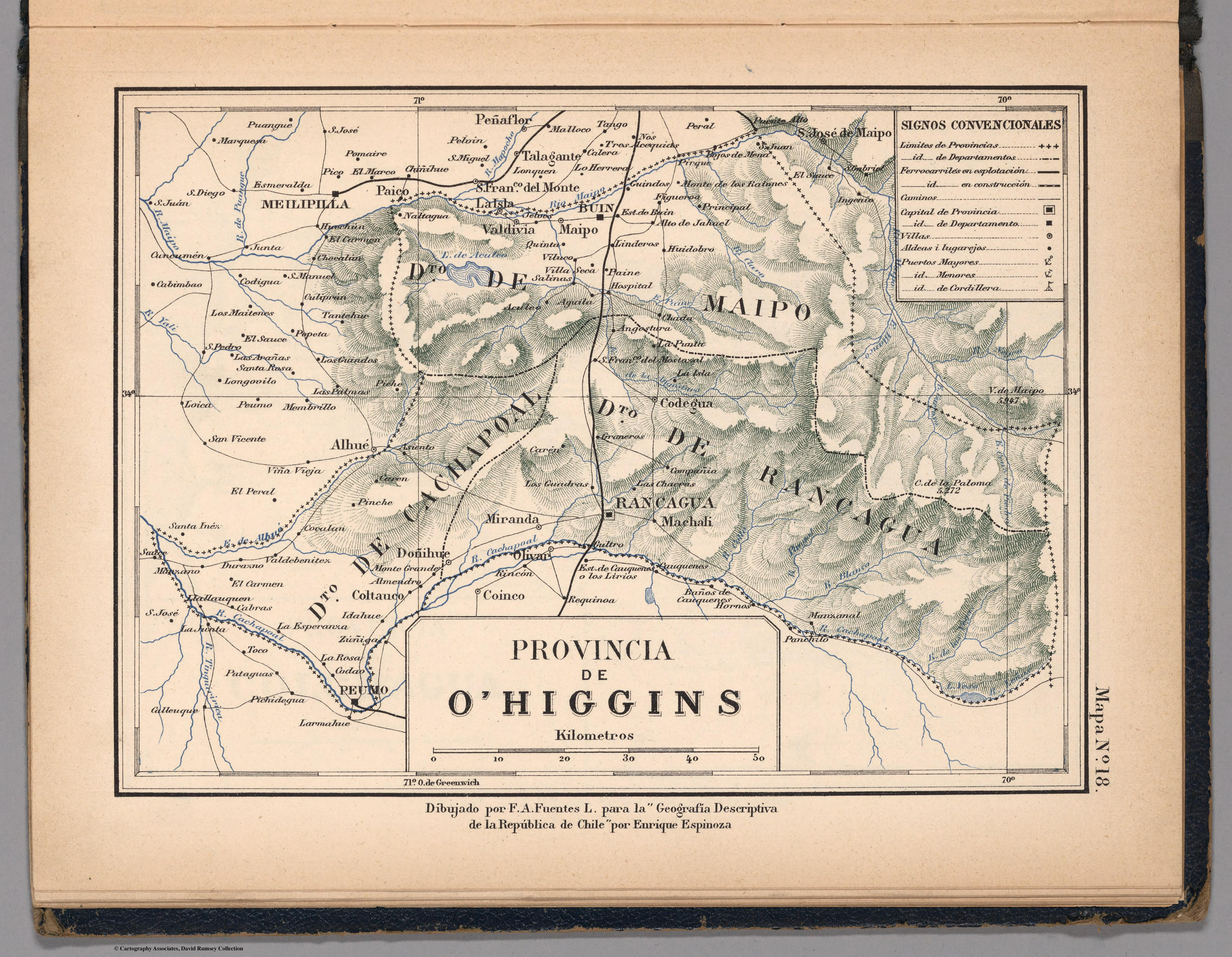 Atlas de Chile Arreglado para la Jeografia Descriptiva de la Republica de Chile por Enrique Espinoza.